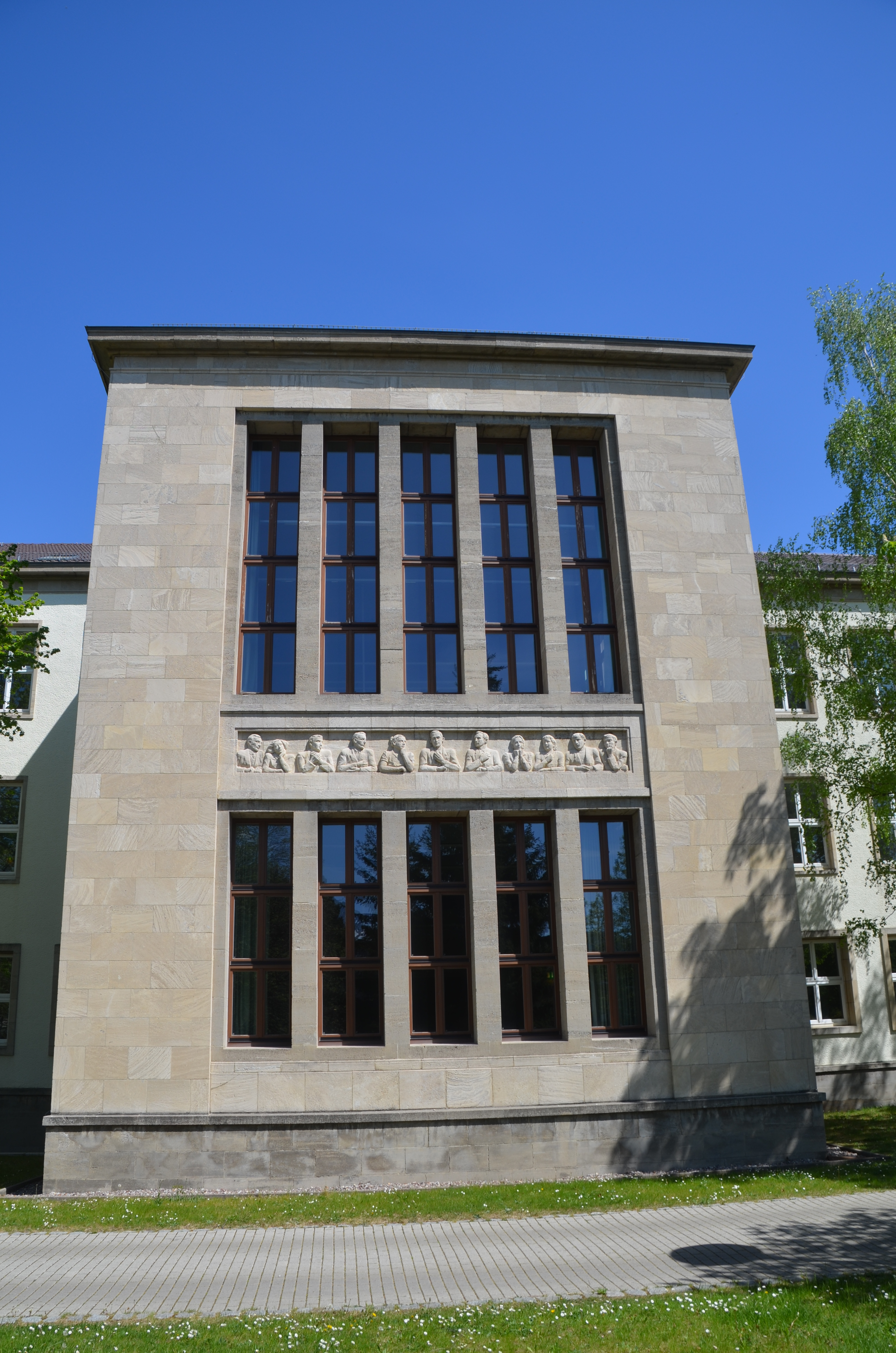 Hörsalbau am Lehrgebäude 1 der Universität Erfurt